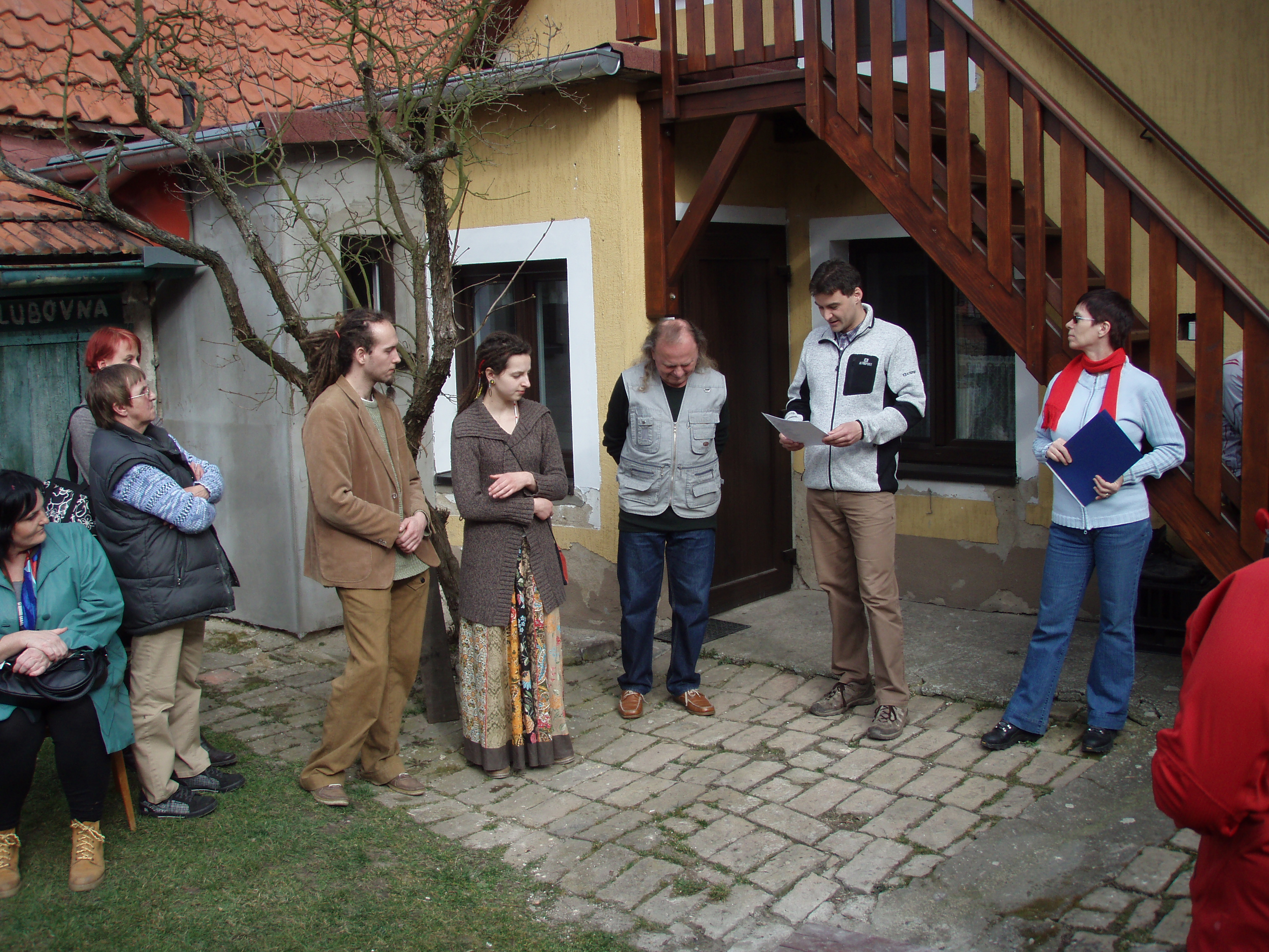 Vernisáž výstavy Josefa Sedláčka – Vodopády České republiky.